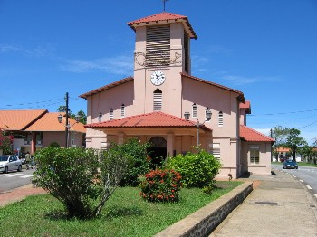 description: eglise de bourg de macouria auteur : didwin